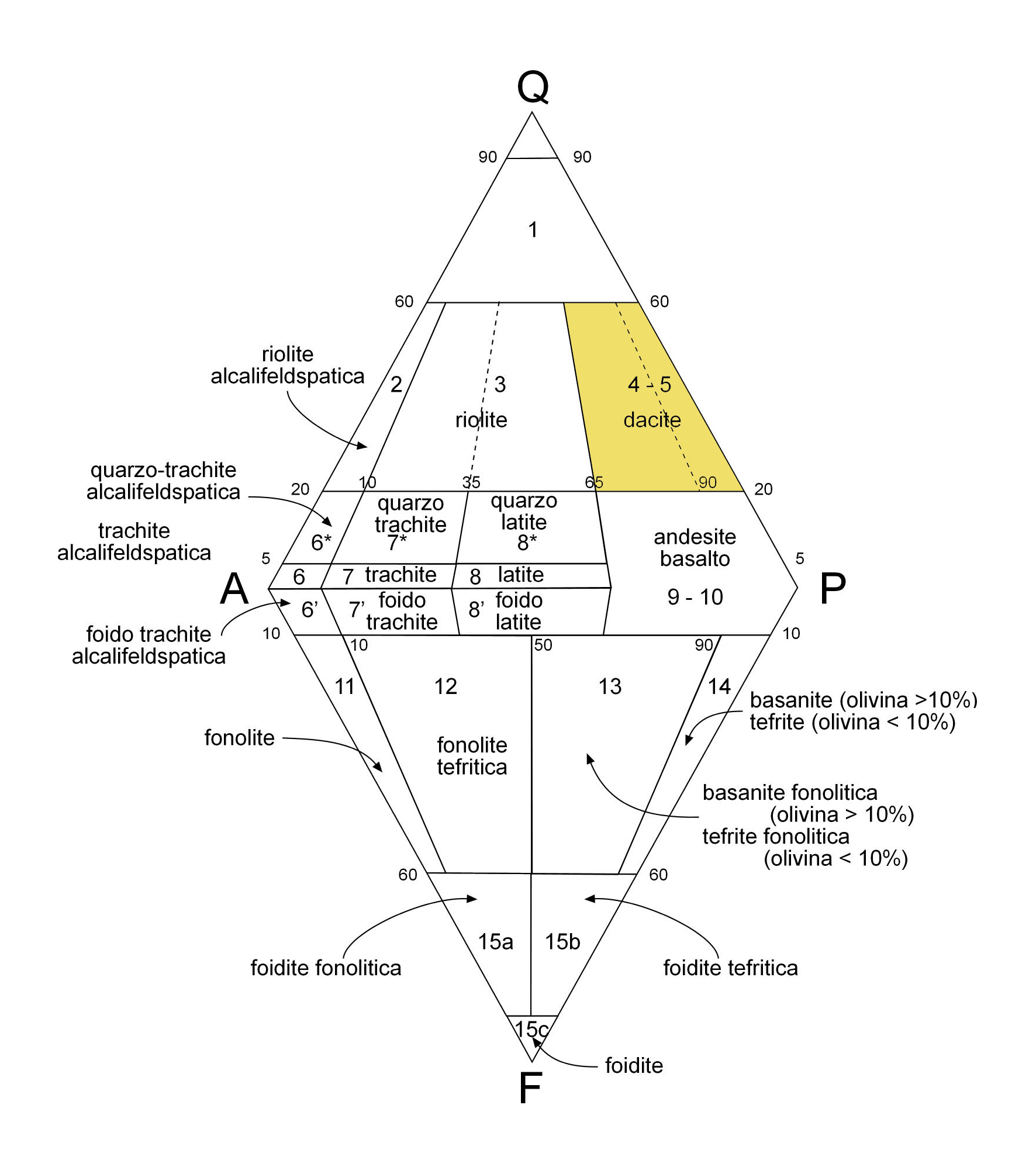 Posizione delle daciti nel doppio triangolo QAPF